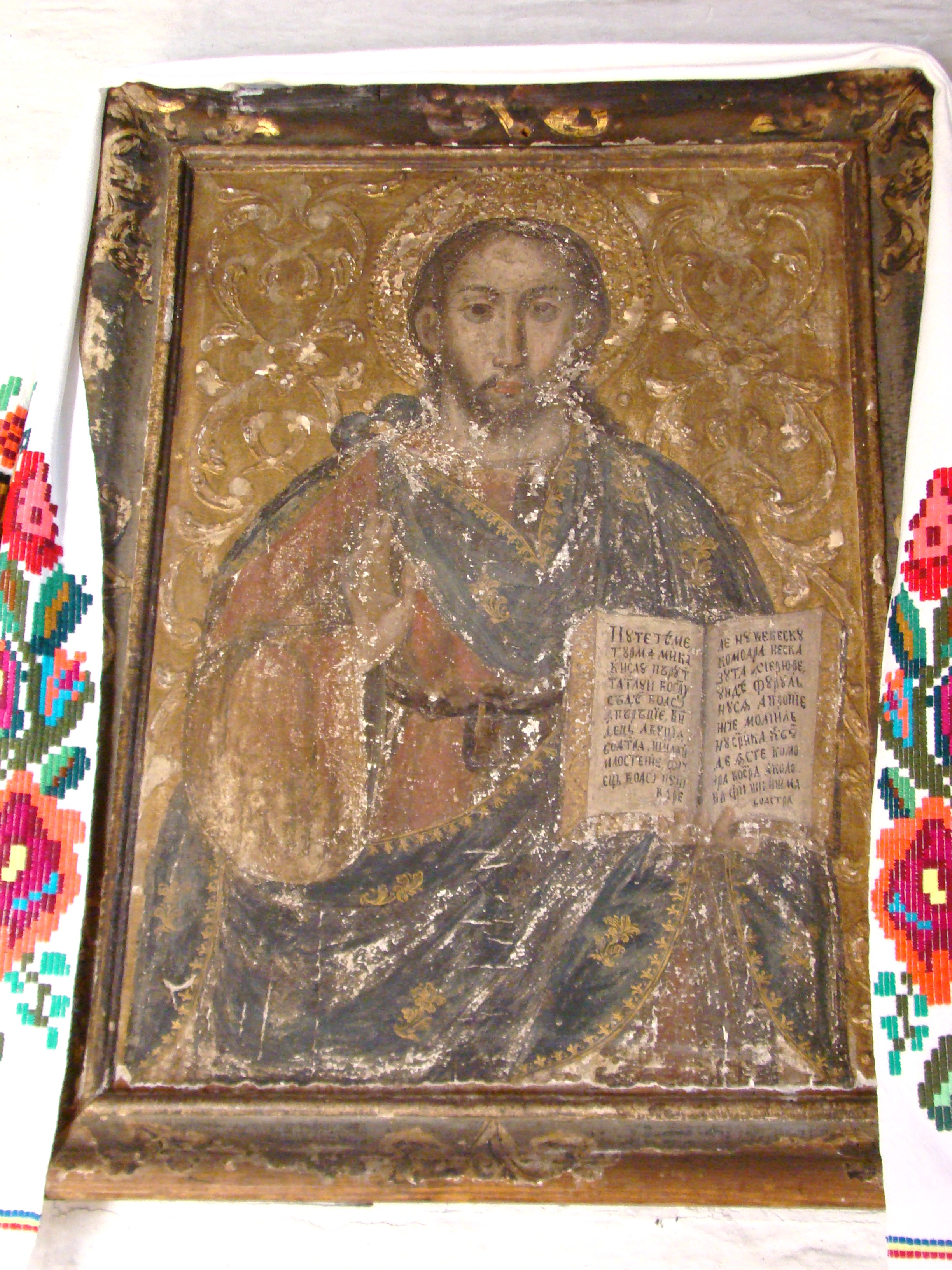 Biserica de lemn "Sfinții Arhangheli Mihail şi Gavril", sat PLOPIŞ; comuna ŞIŞEŞTI